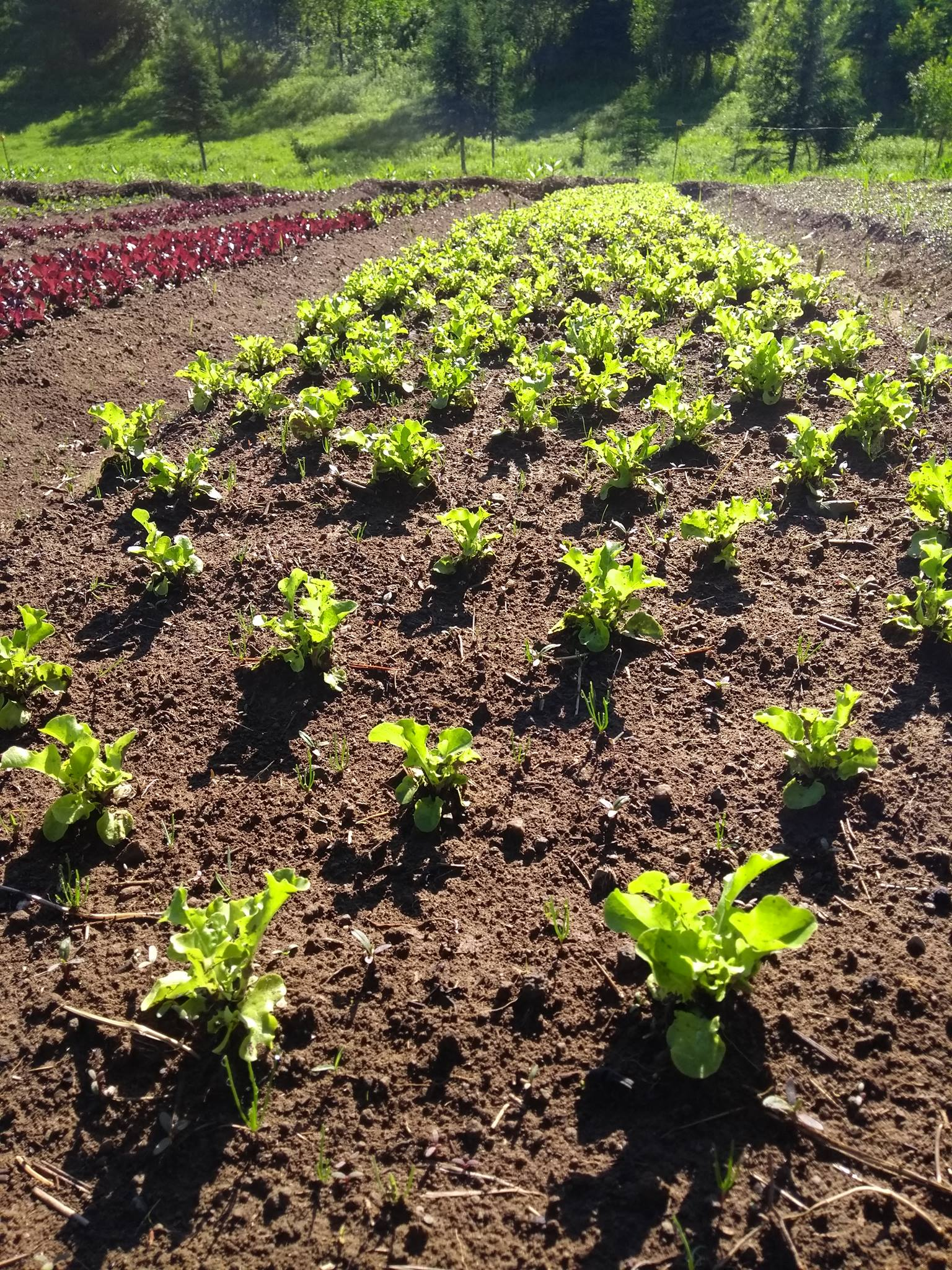 Semis de laitues en serre puis repiqués au champ